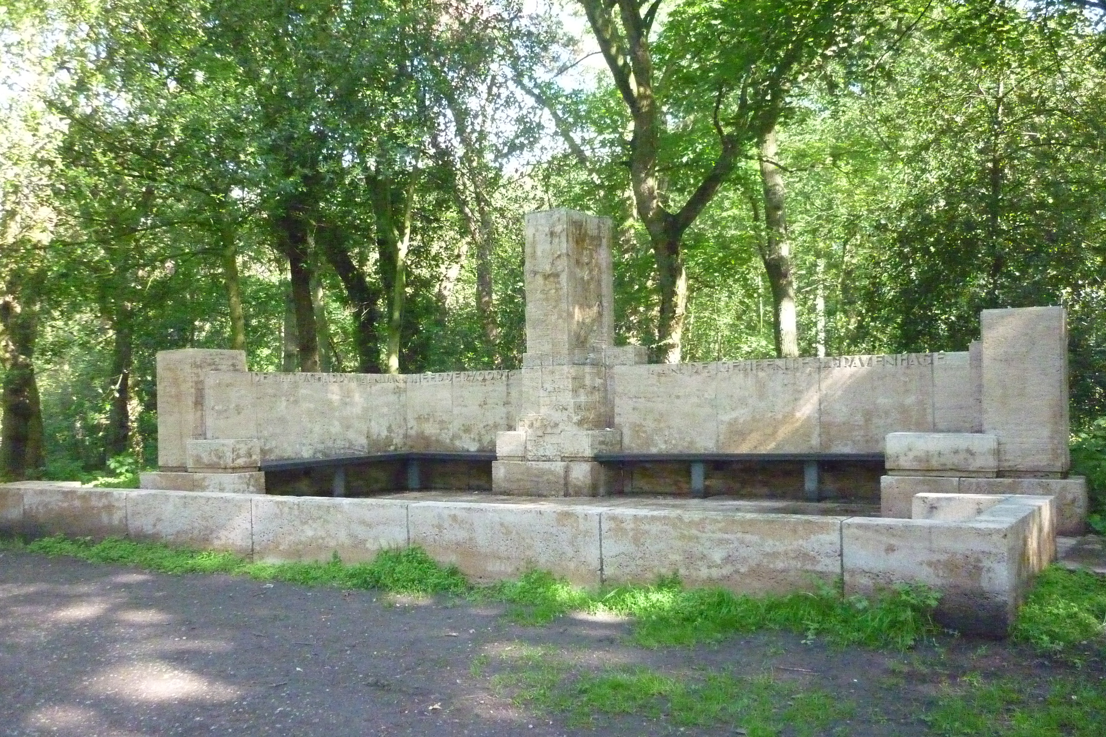 Monument in de Bosjes van Zanen, geschonken door Martinus van Zanen aan de gemeente Den Haag in 1932